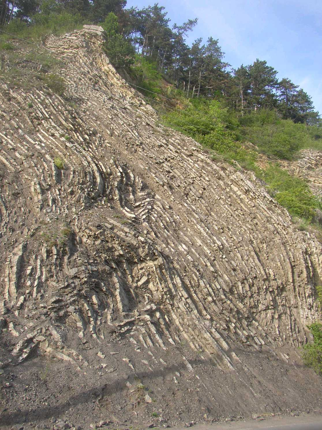 Budňanská skála v Karlštejně je pomocným mezinárodním geologickým rozhraním silur-devon. Autor: vyfotografoval Miaow Miaow v červnu 2005